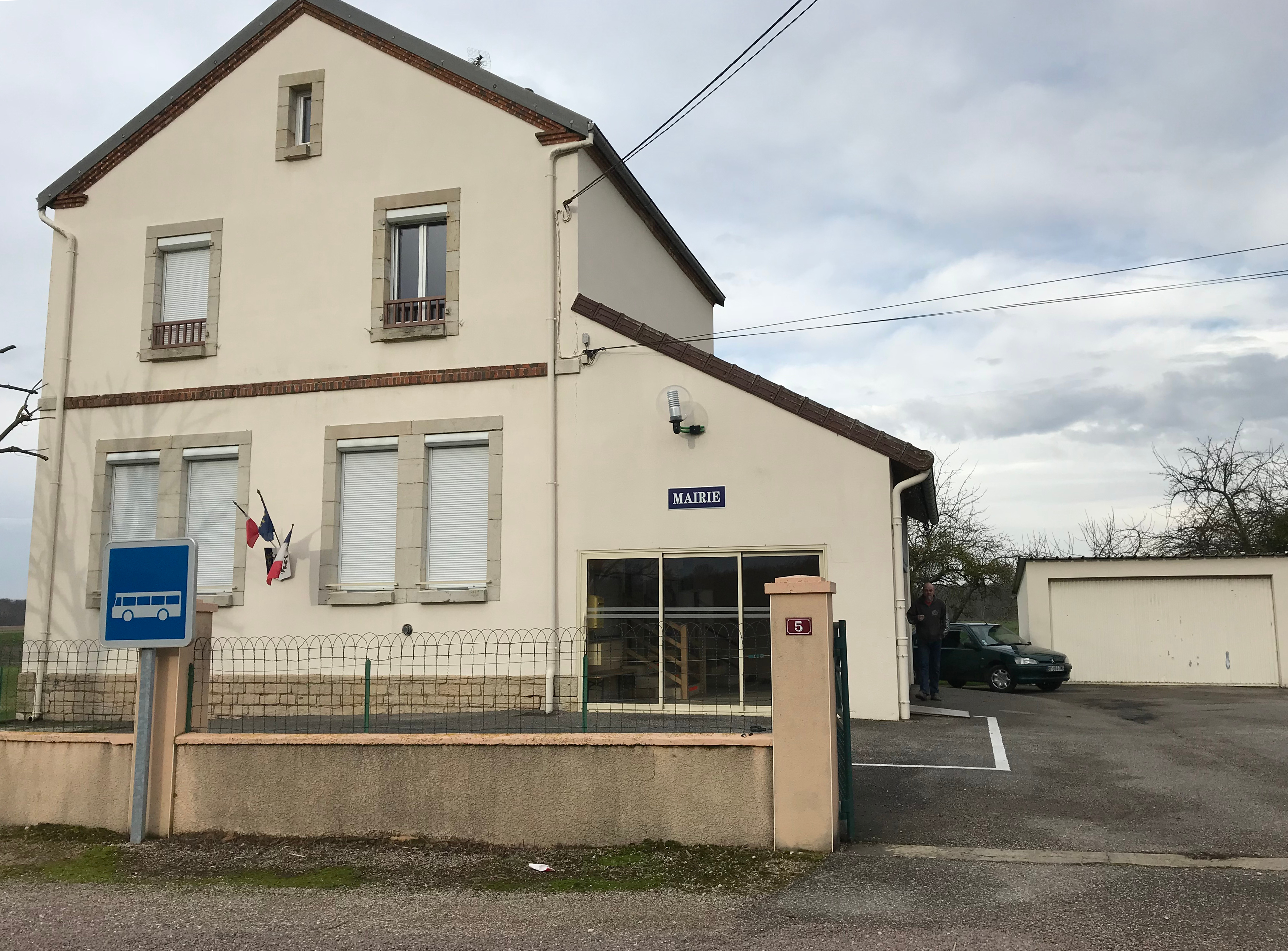 Chêne-Bernard (Jura, France) en janvier 2018.